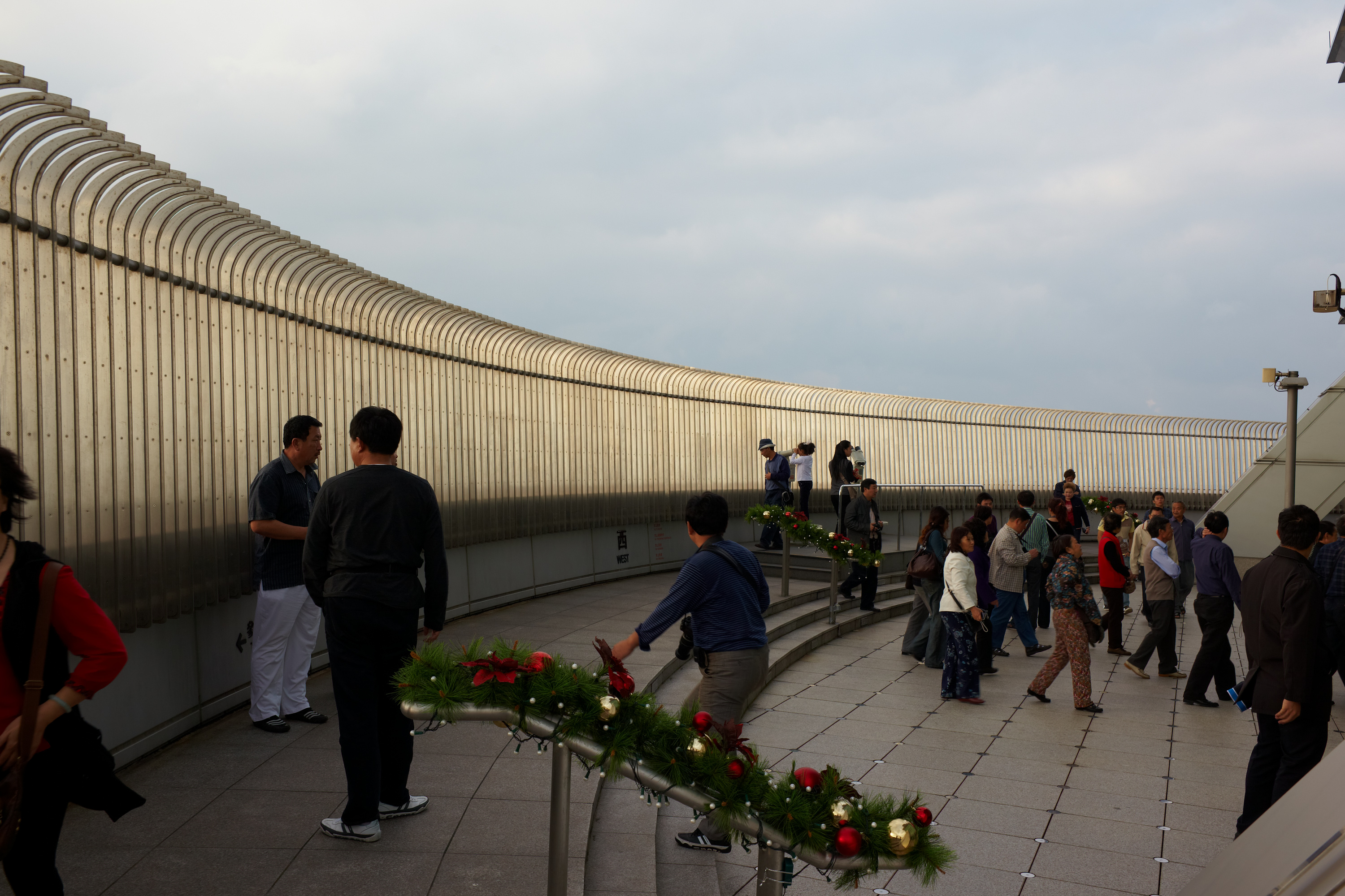 Taipei 101 observatory